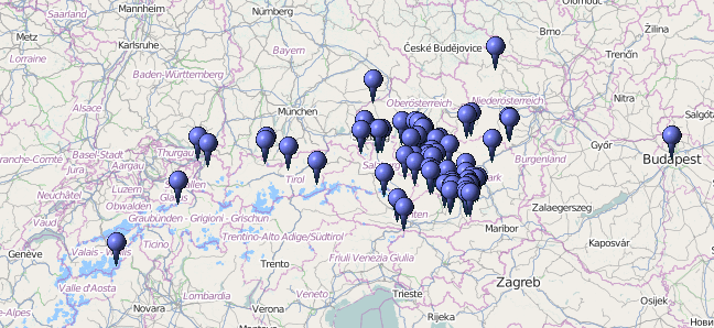 Verbreitung des Toponyms "Ofen" für Felsformationen